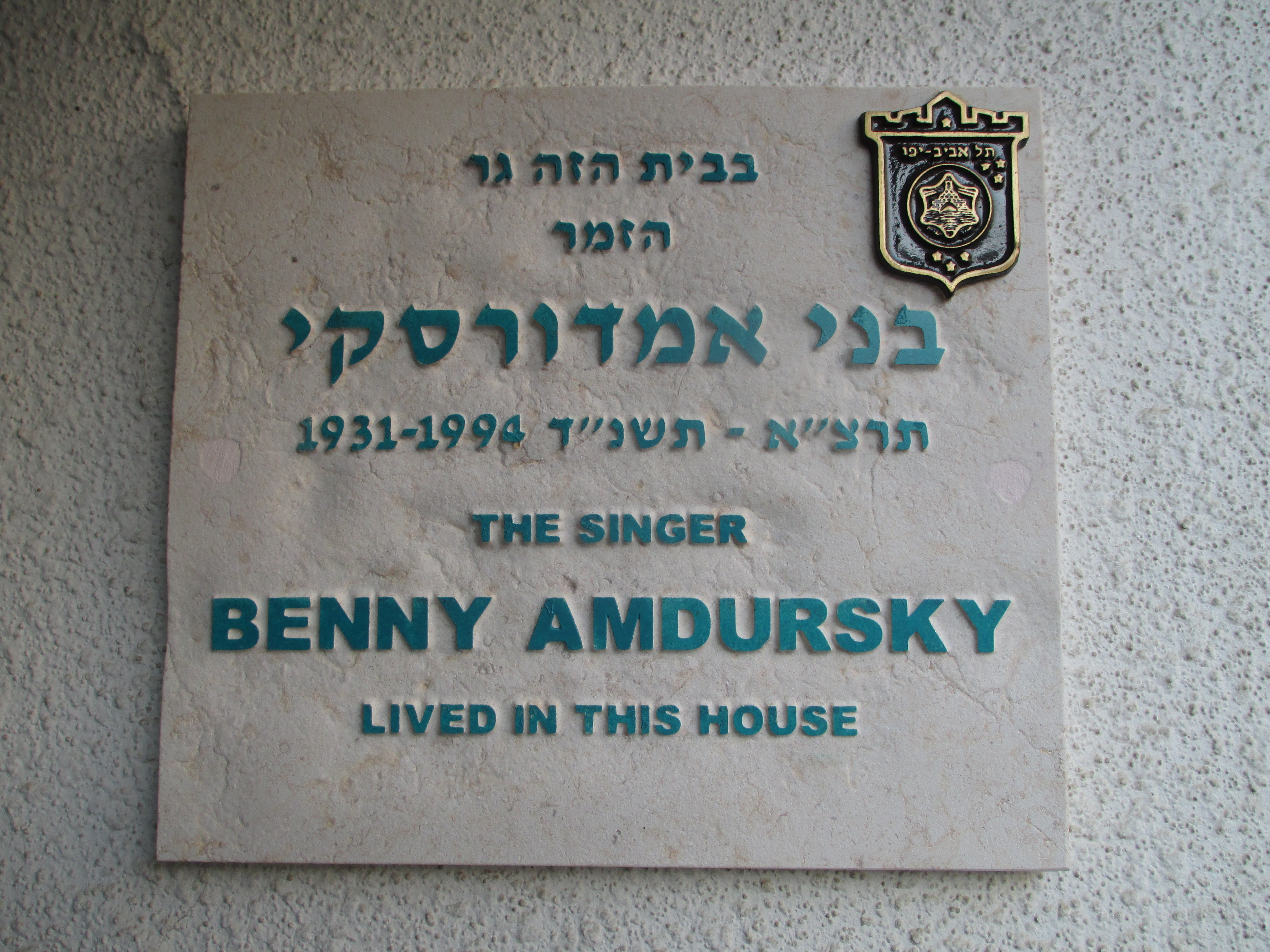 לוחית זיכרון בכניסה לביתו של הזמר בני אמדורסקי בתל אביב